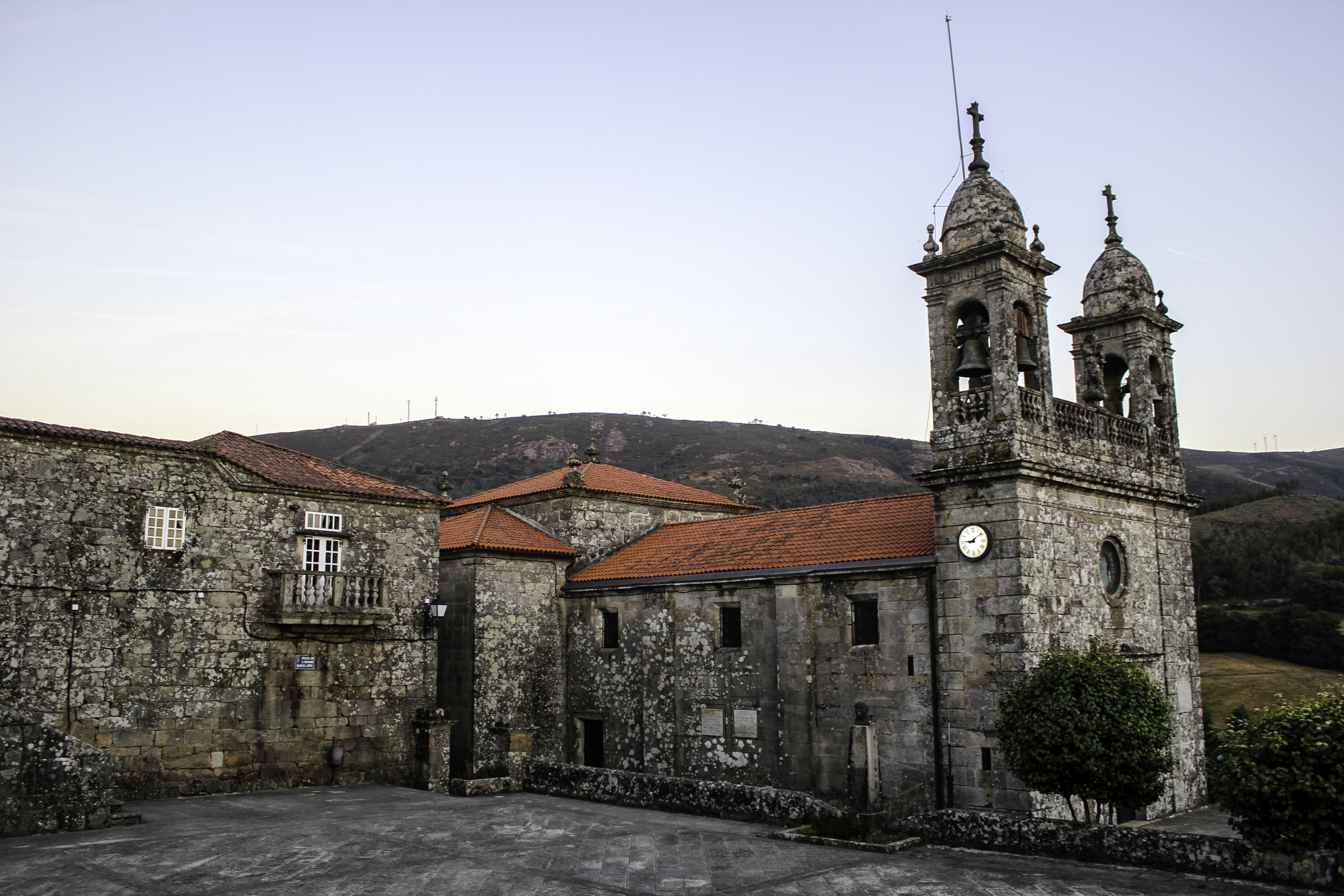 Igrexa de San Xoán de Cerdedo.